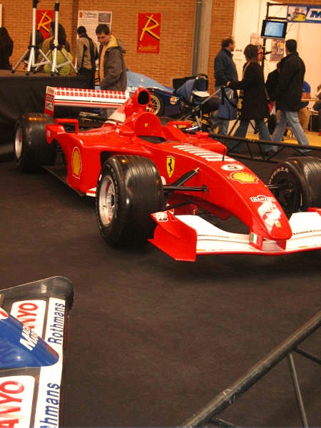 Ferrari de Fórmula 1 en el Motor Show de Zaragoza.